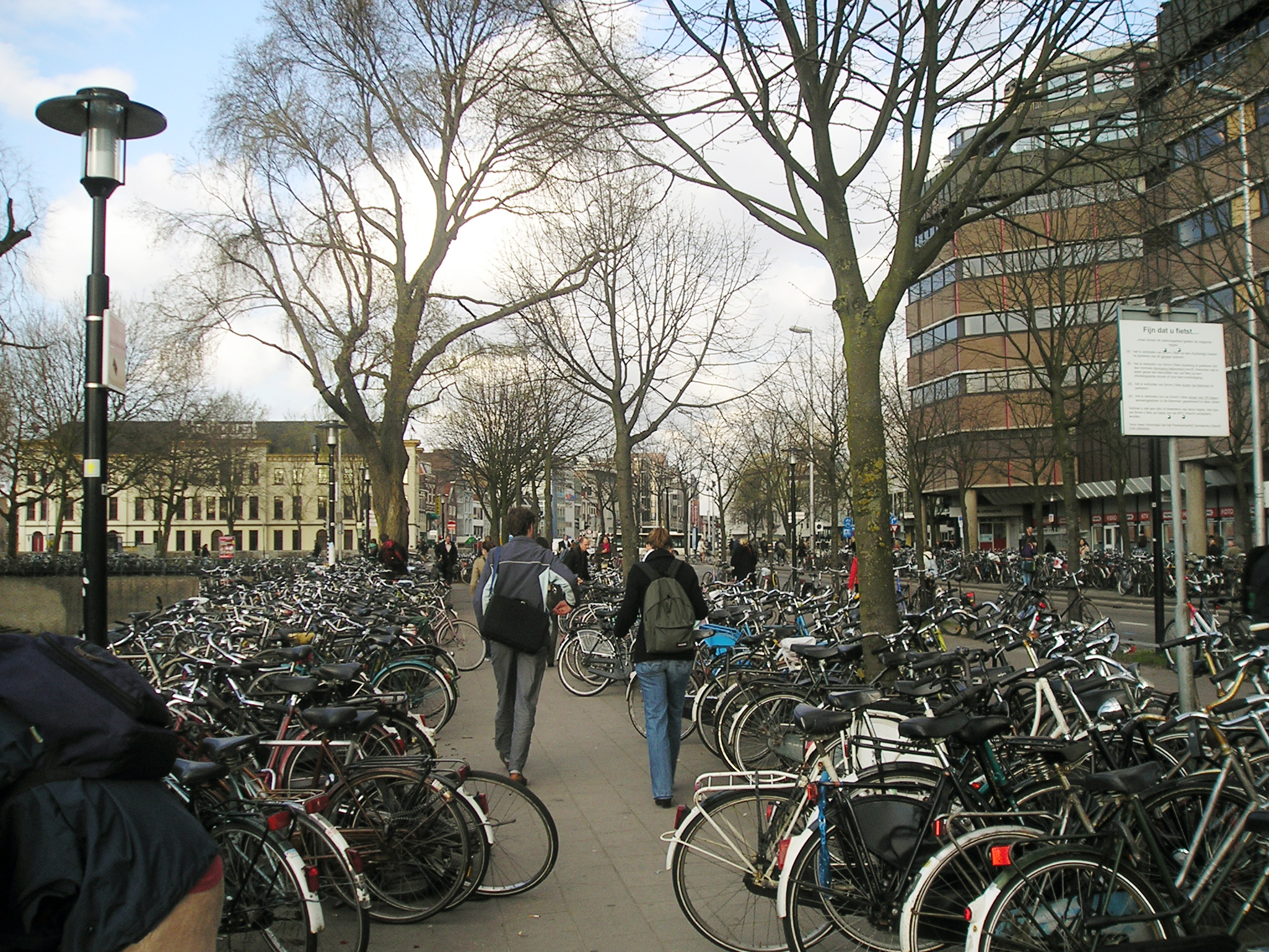 Utrecht, un pòst andova la gent a lassa le bici (Utrecht, a parking lot for bycicles)